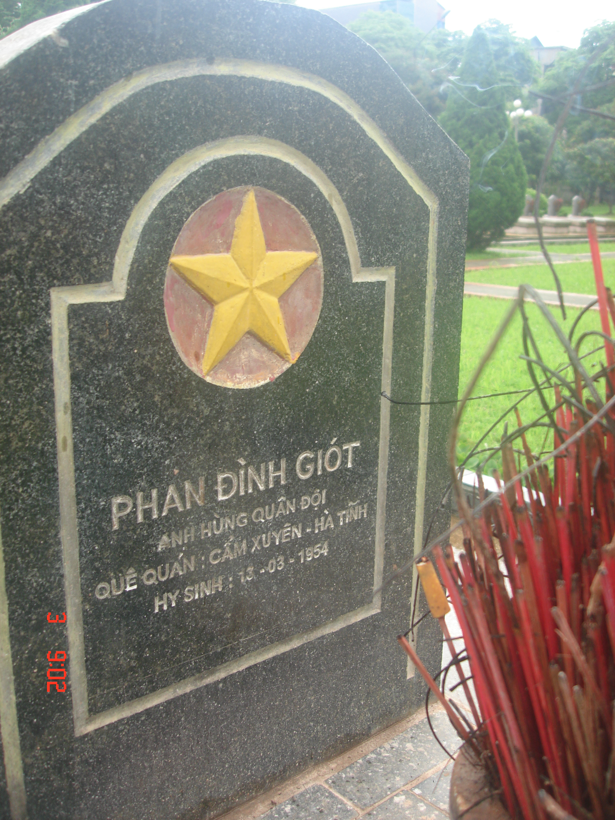 Giấy phép